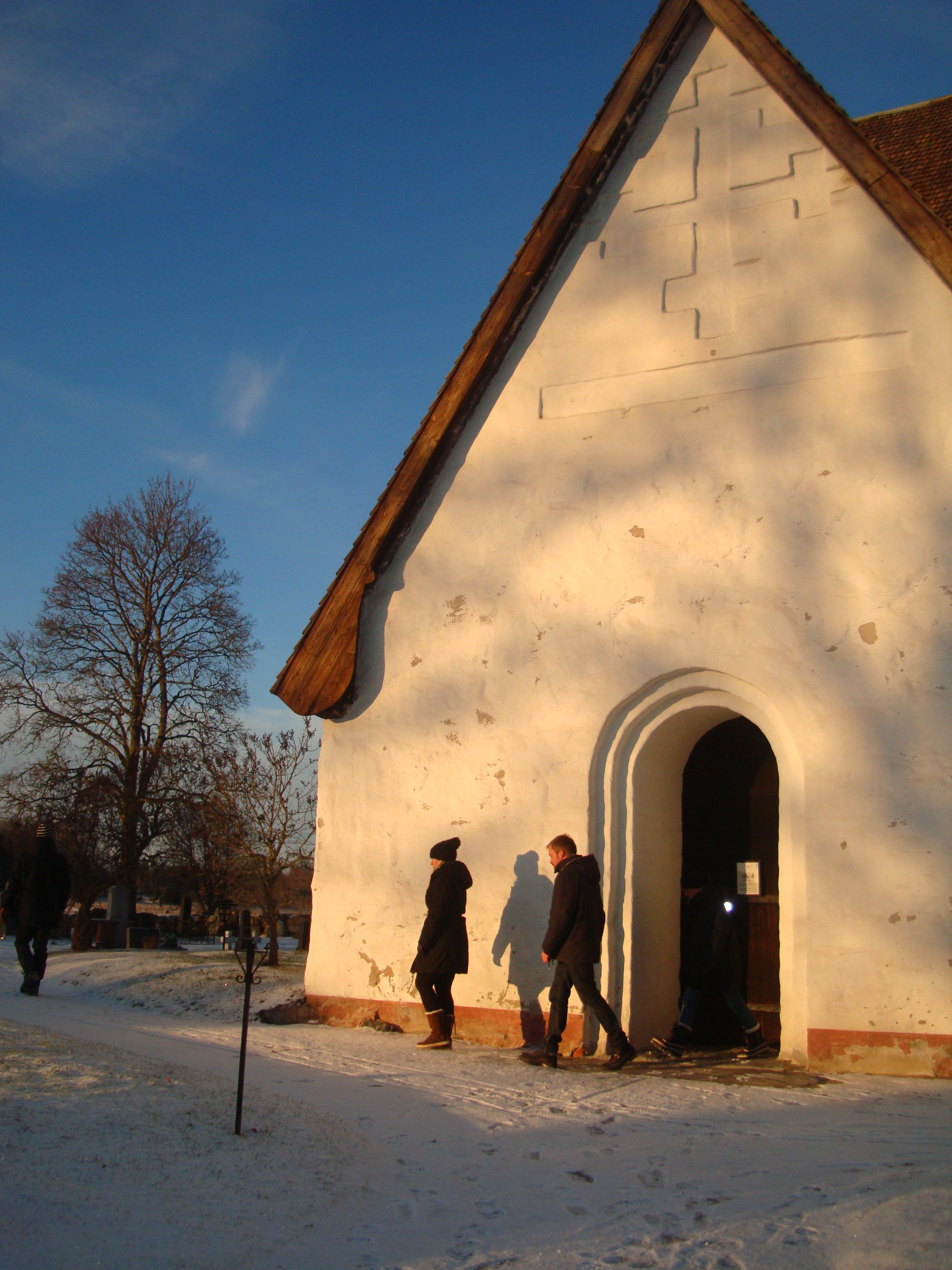 Valö kyrka från sent 1200-tal. Norduppland, Östhammars kommun.